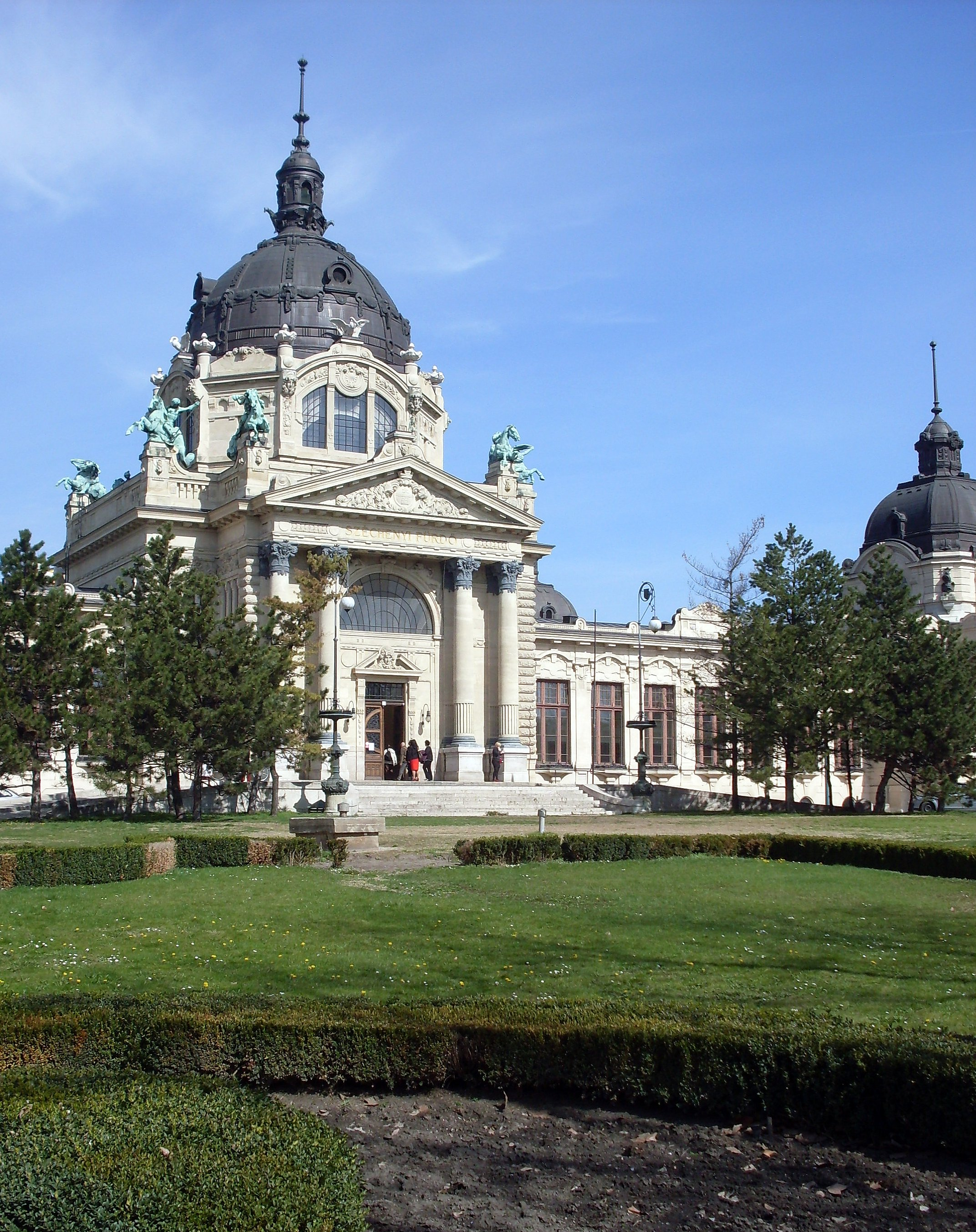 Foto genomen in Boedapest, april 2013